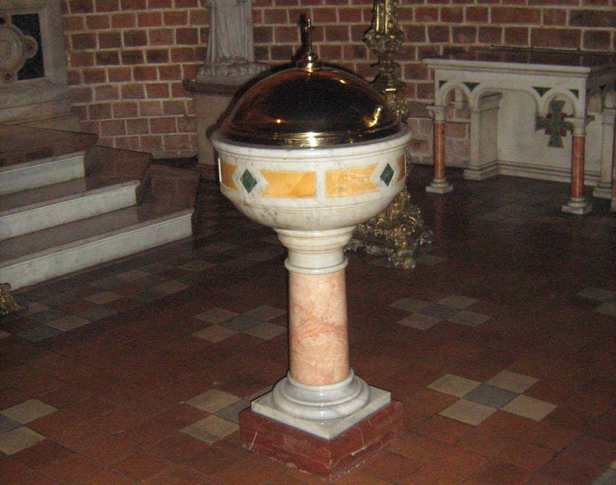 Pila bautismal de la catedral Metropolitana de Medellín. Colombia